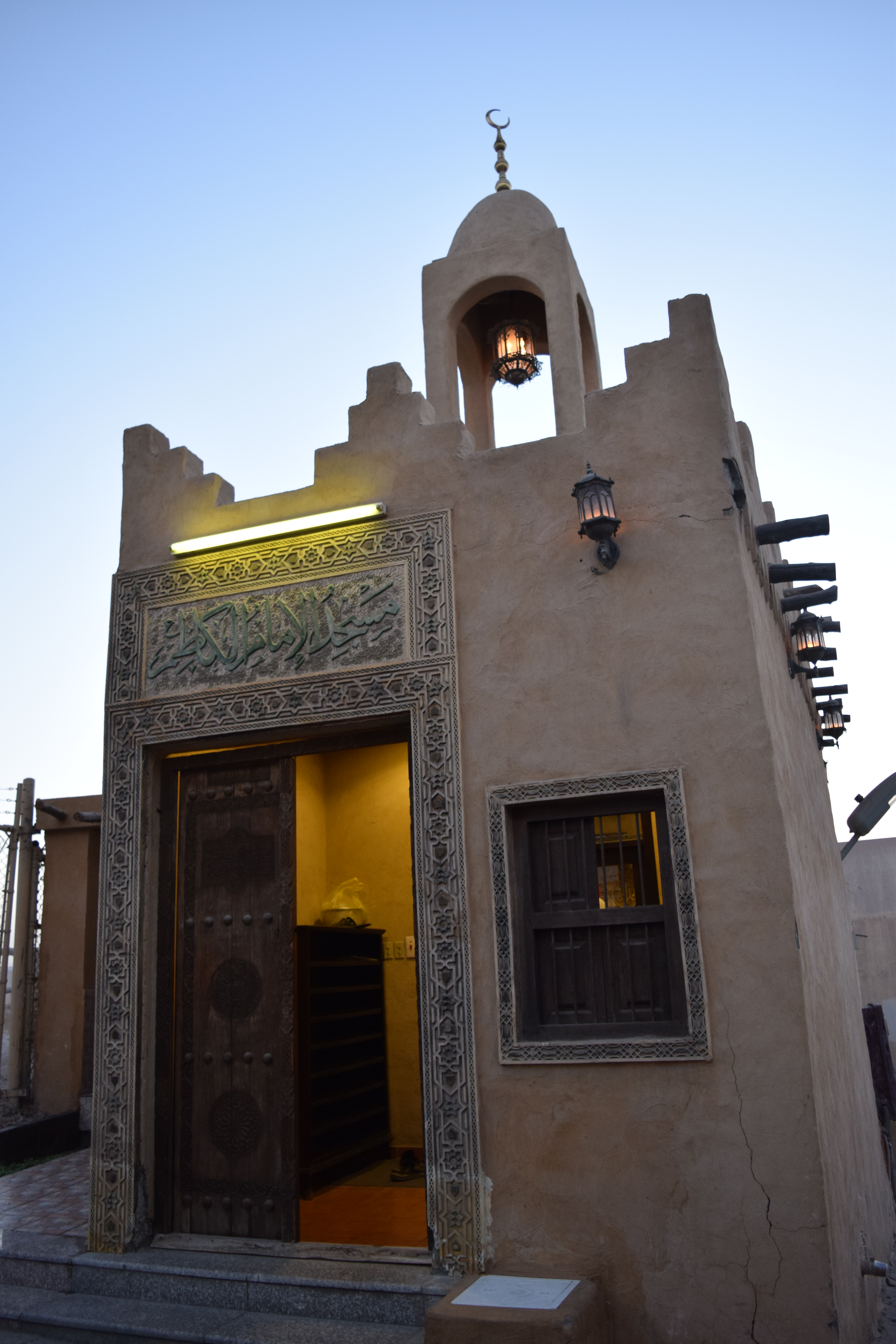 صورة لمسجد الكاظم بالقرب من قلعة تاروت